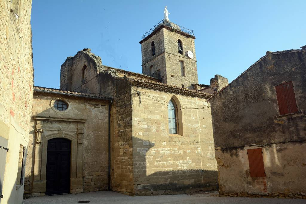 Eglise Saint-Sauveur